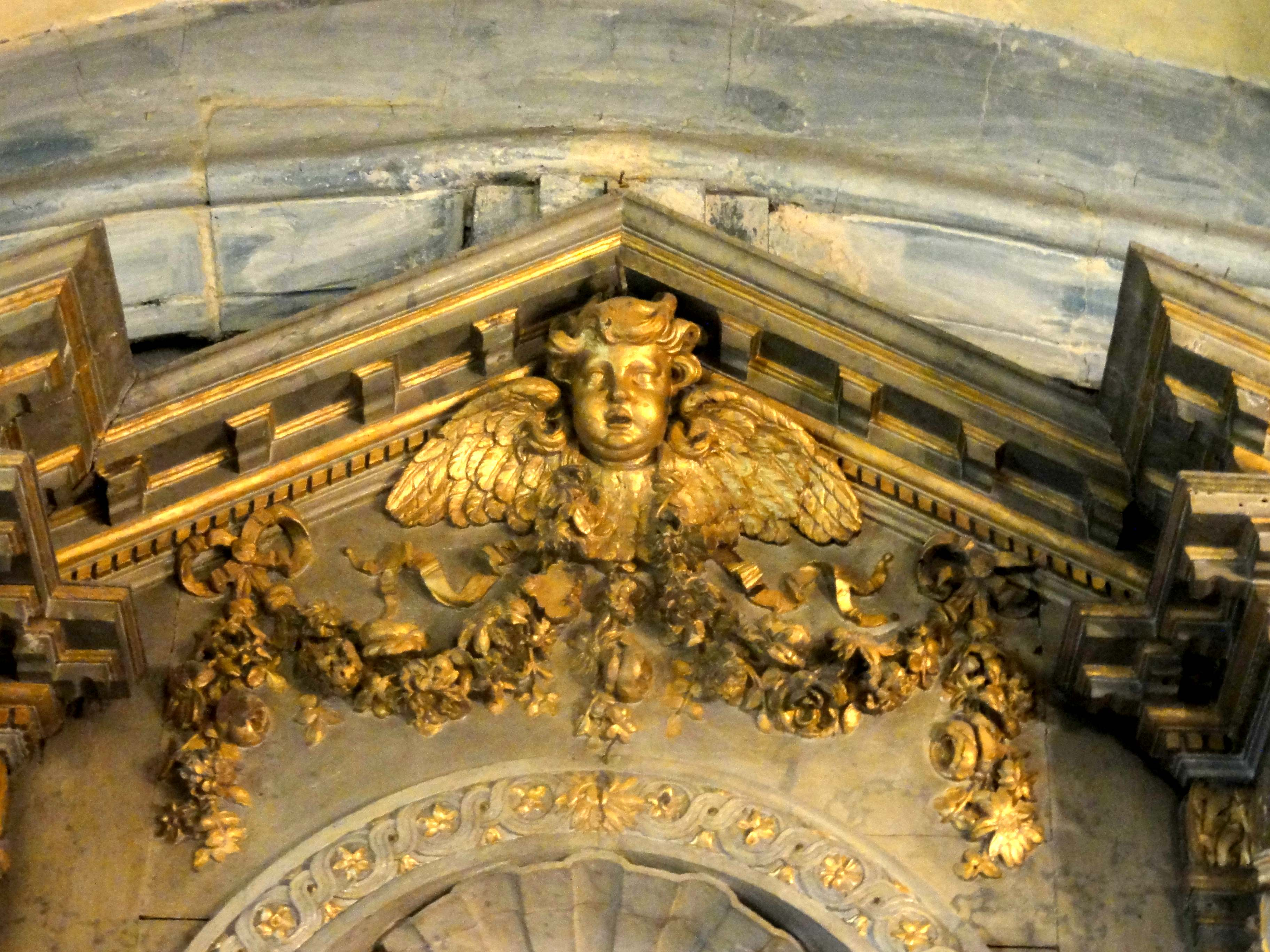 Autel et retable de la Vierge.